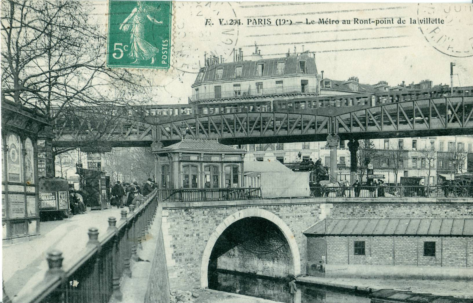 carte postale ancienne éditée par EV N° 294Paris XIXe arrondissement : Le métro au rond-point de la Villette (aujourd'hui : Place de la Bataille-de-StalingradOn distingue, de bas en haut : l'écluse située à l'extrémité du Bassin de la Villette qui se transforme en Canal Saint-Martin. Sur l'embouchure du canal se trouve un kiosque de la Compagnie générale des omnibus, qui était une des compagnies de tramways et de bus de Paris. Au dessus se trouve le viaduc de la ligne 2 du métro de Paris alors exploitée par la CMP